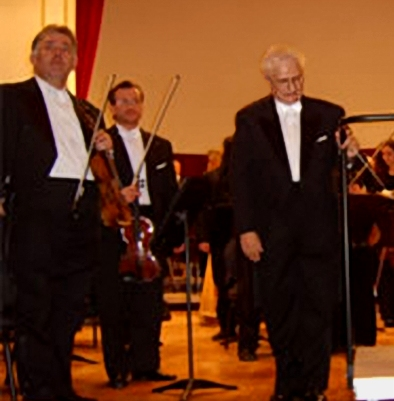 Retouched version of Datei:Acel.jpg, which has the following description: (Changes see below) Beschreibung=Dieses Bild zeigt Maestro Ervin Acél nach einem seiner letzten Konzerte, die er in der Philharmonie in Oradea dirigiert hat (2005). Acél war u.a. Chefdirigent des Philharmonischen Orchesters Oradea und der Szegeder Philharmonie. Quelle=Selbst gemachtes Foto aus dem Publikumsbereich des Konzertes Urheber=user:Bulzanvladi Datum=December 2005 Genehmigung=frei